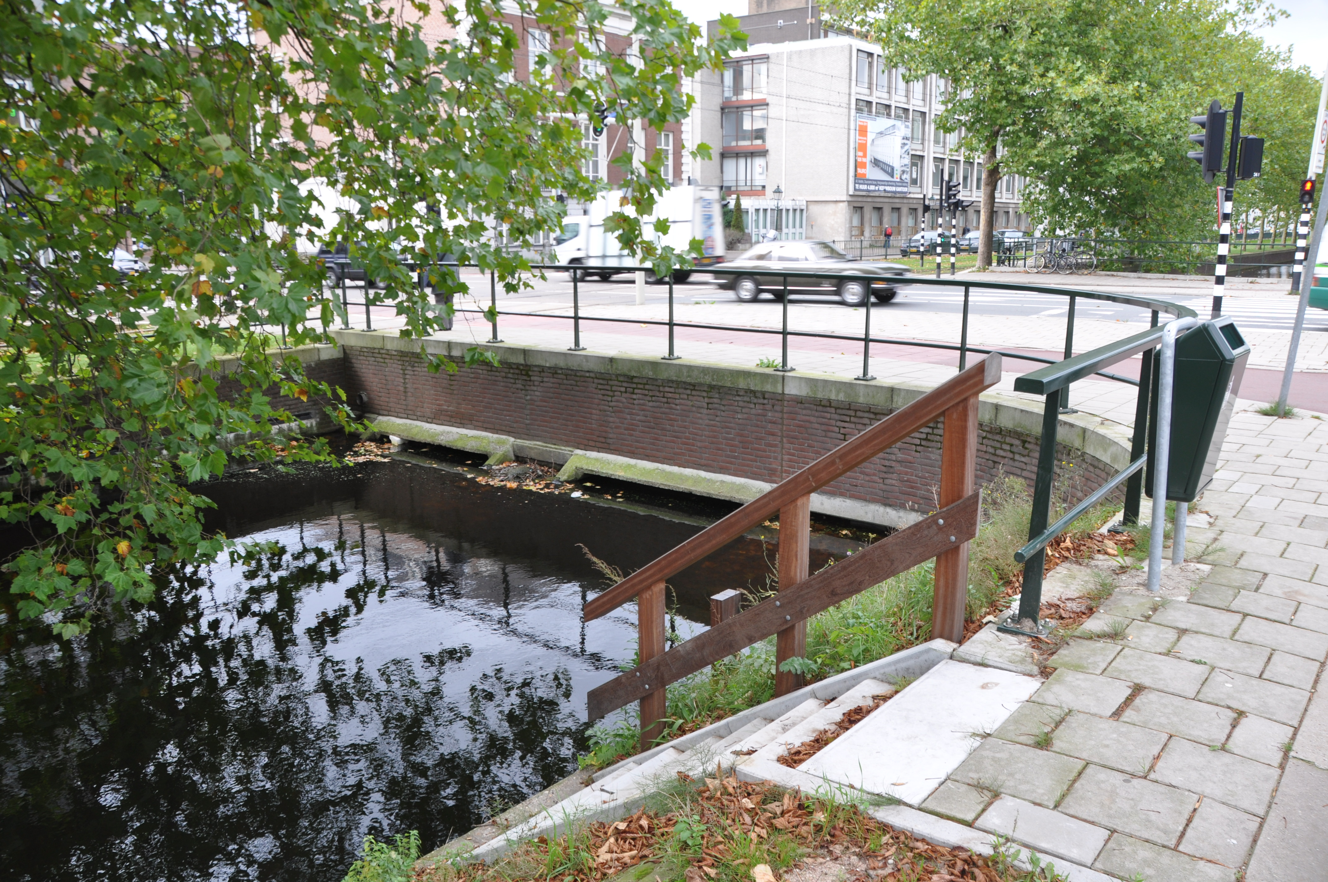 Bruggen in Den Haag.